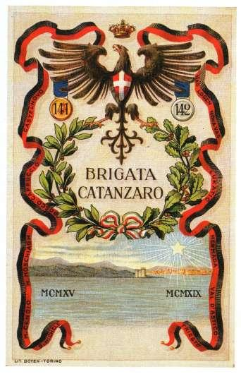 collana canaca